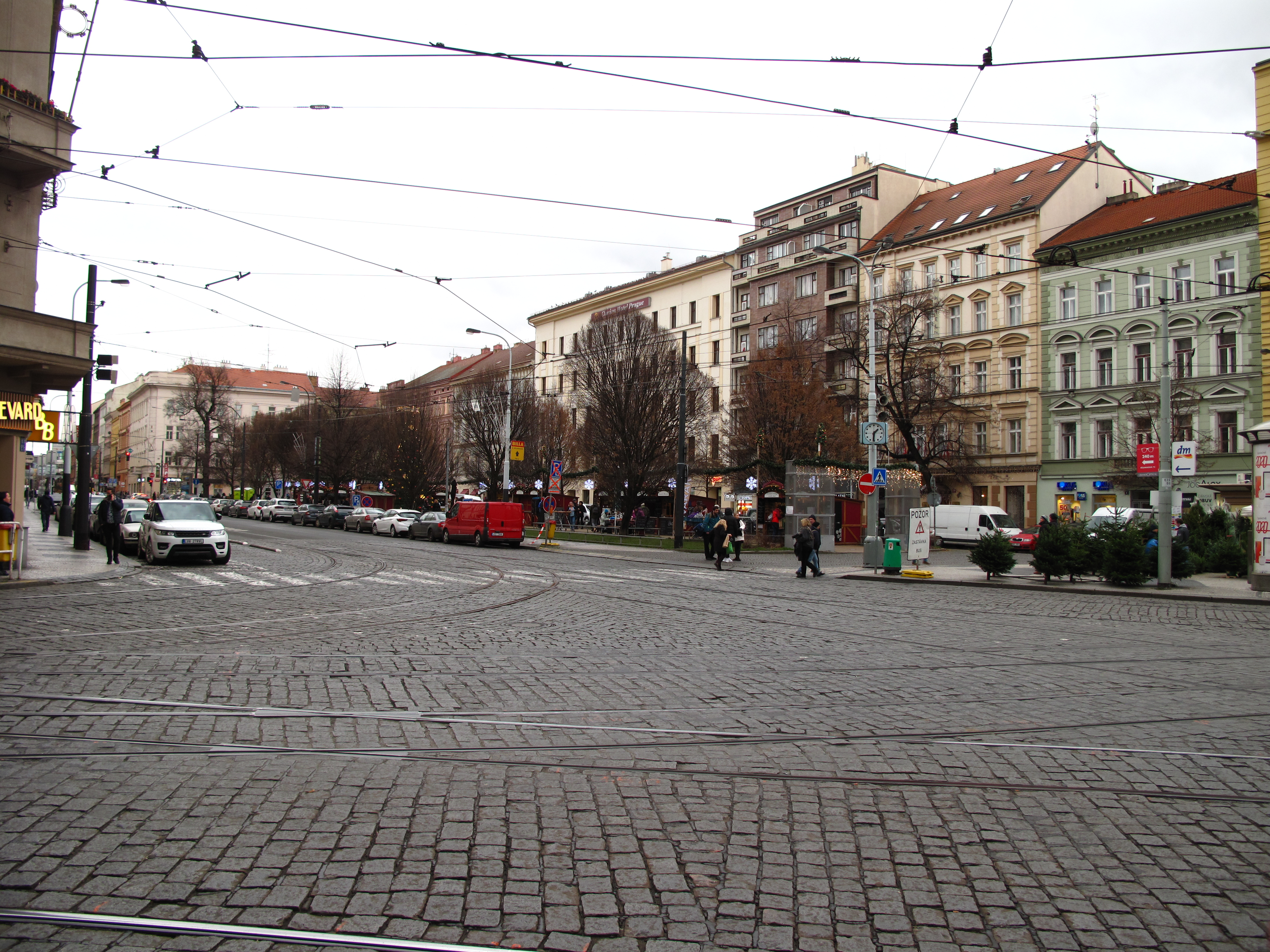 Tylovo náměstí v Praze.